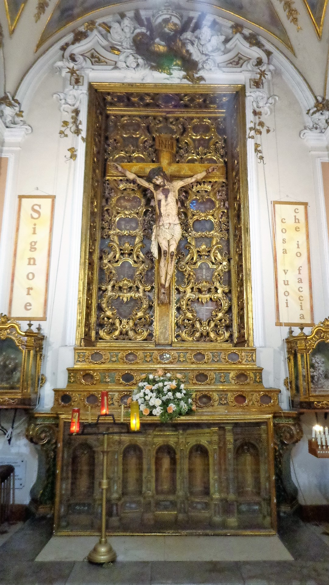 Altare Santissimo Crocifisso e reliquiario, chiesa di Sant'Antonio di Padova. Ultima opera di frate Umile da Petralia portato a compimento nella fase di coloritura da frate Innocenzo da Petralia